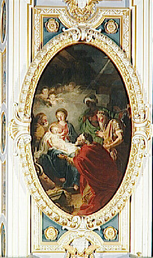 Adorazione dei Magi, olio su tela, 238 x 148 cm, Musée national du château de Fontainebleau